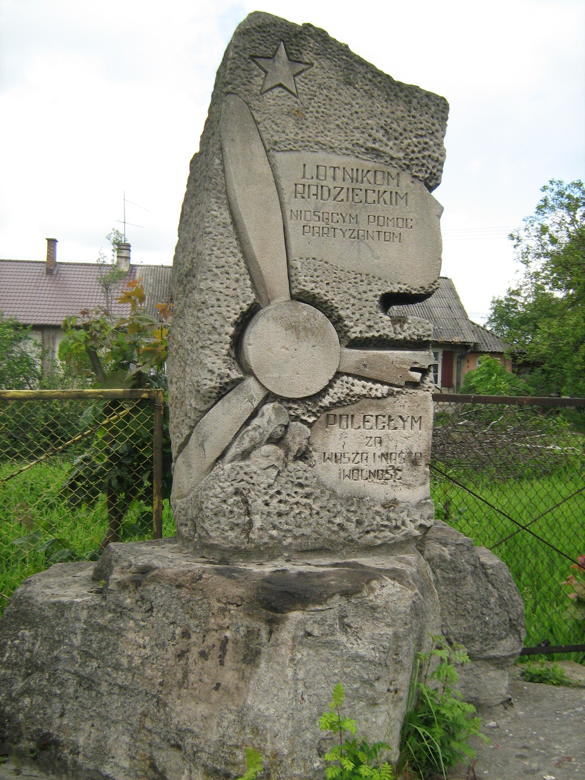 Pomnik lotników radzieckich w Siedliskach (powiat biłgorajski)